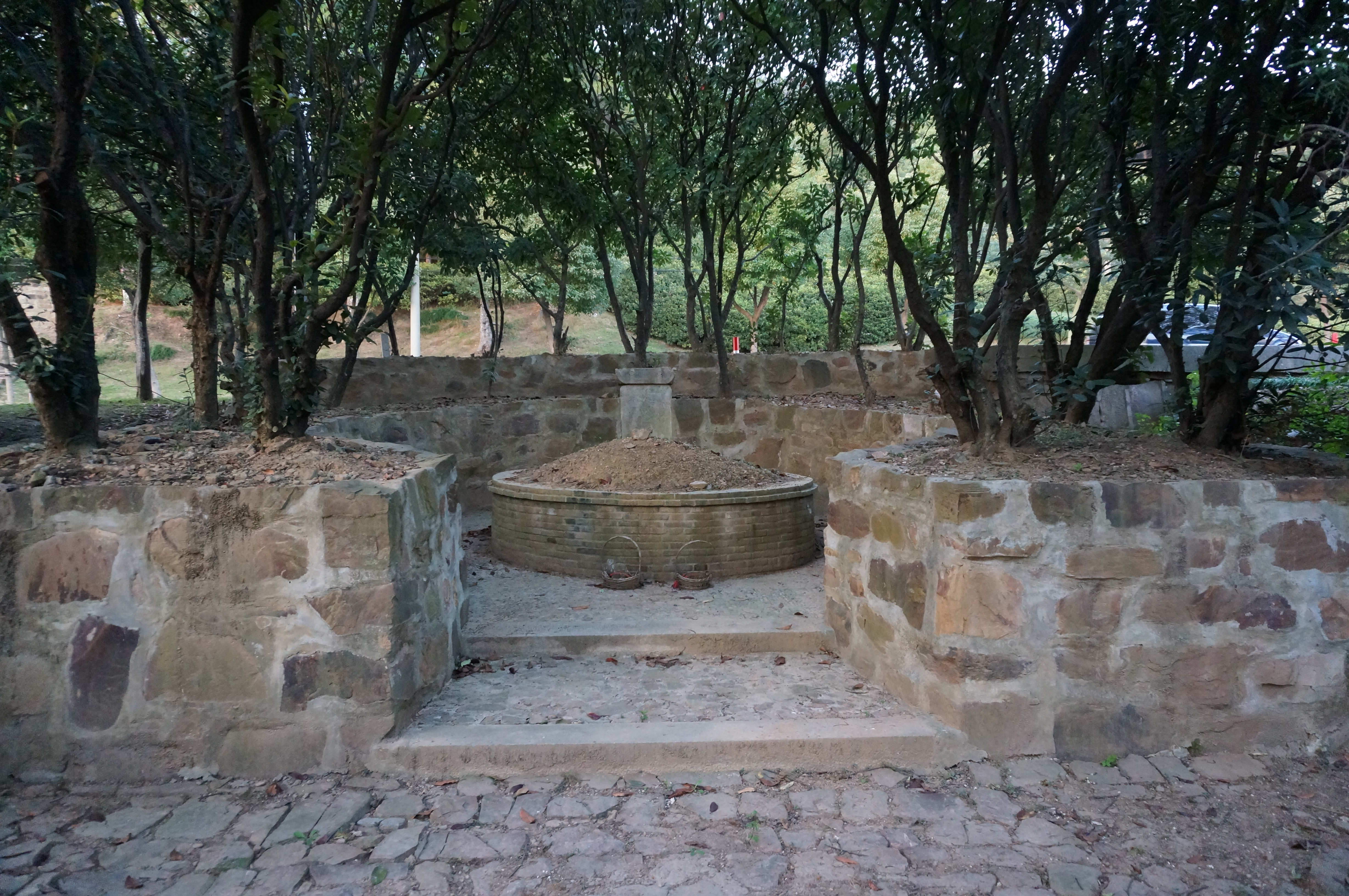 王鈇墓，罗城及墓堆。